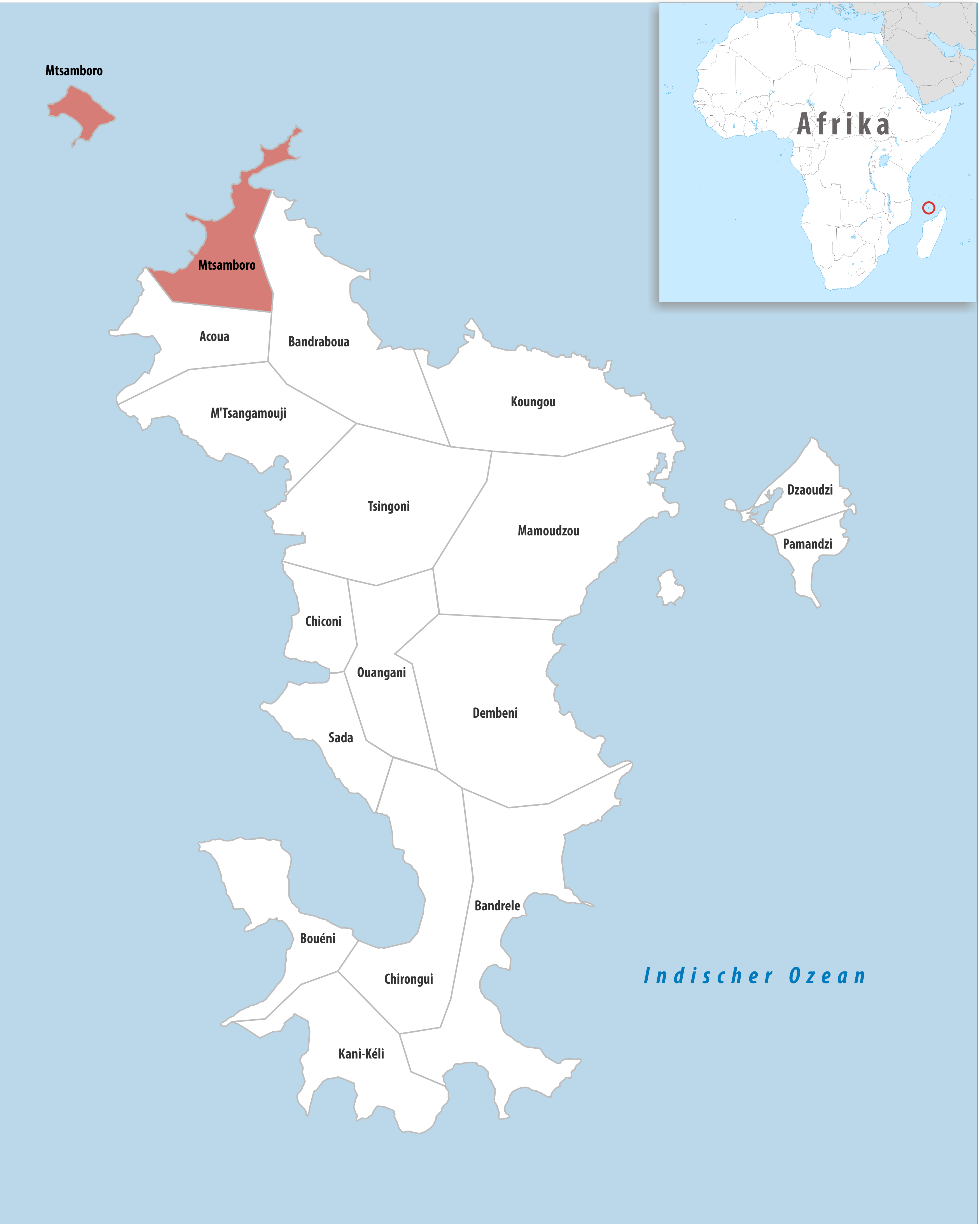 Lage der Gemeinde Mtsamboro